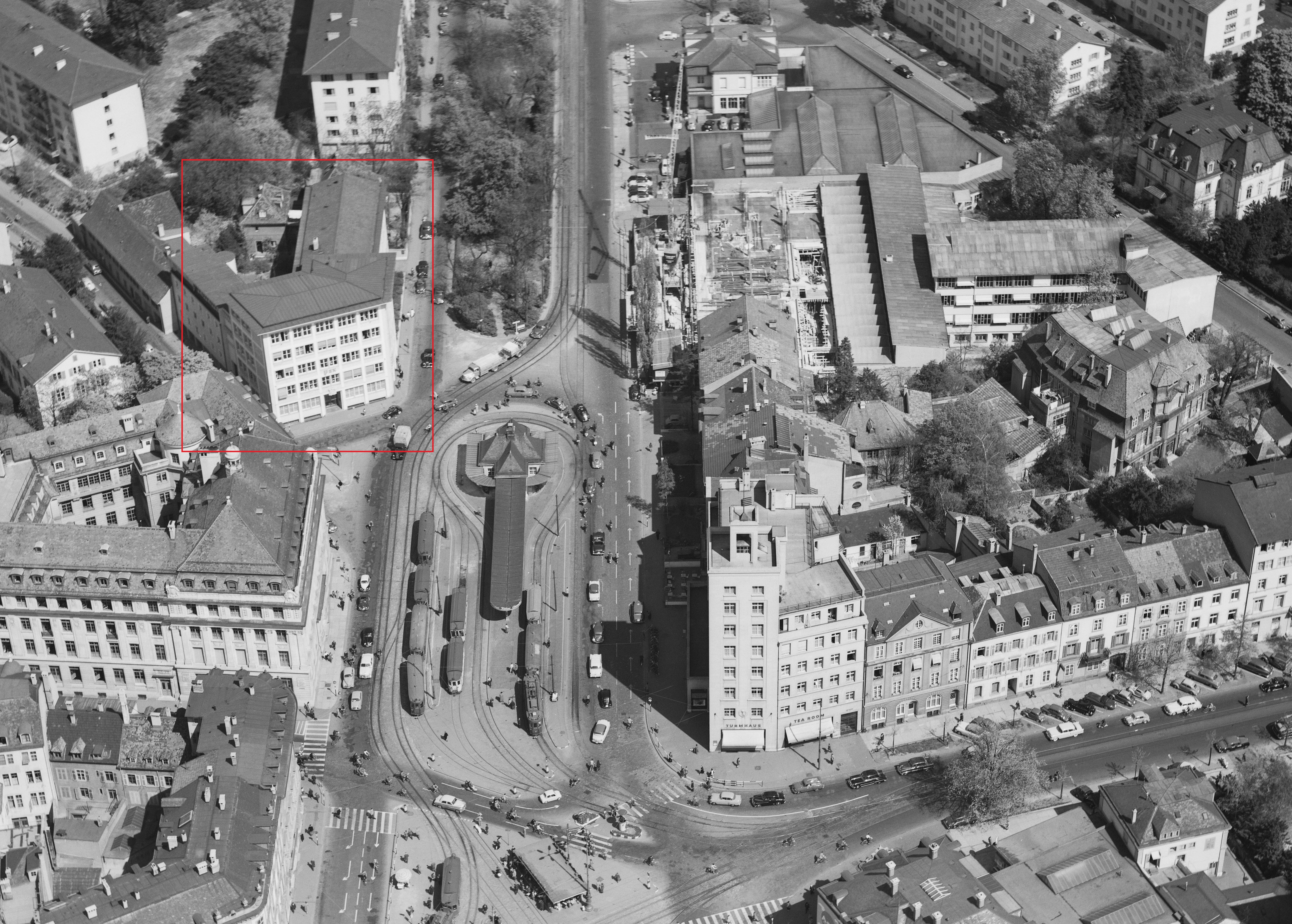 Basel: östlicher Aeschenplatz. Das Pax-Gebäude ist rot hervorgehoben.